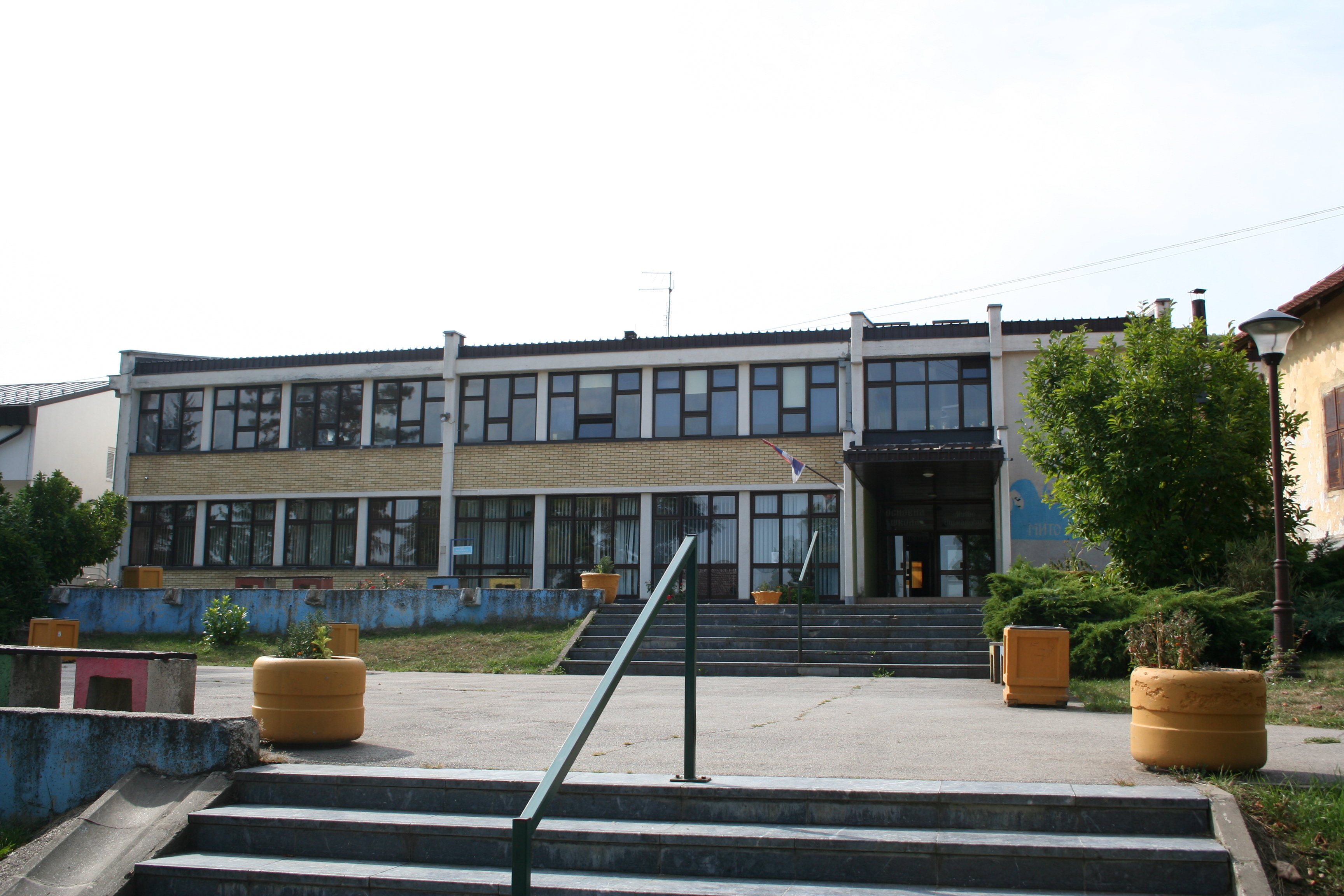 OŠ "Mito Igumanović" Kosjerić